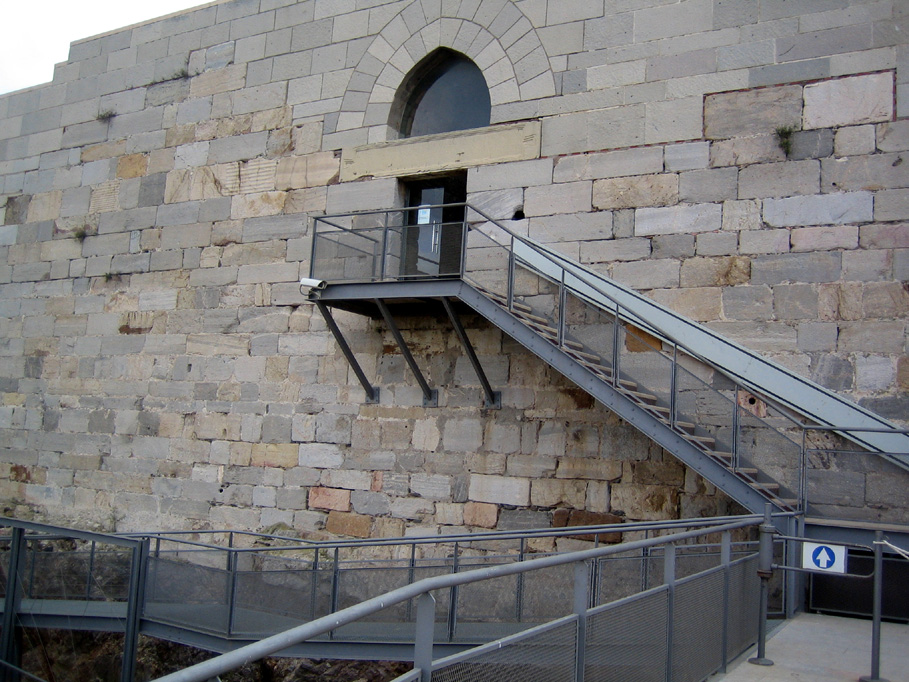 Entrada al Castillo de la Concepción de Cartagena. Sobre la puerta de acceso una lápida romana reutilizada.